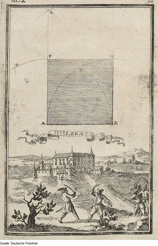 Original image description from the Deutsche FotothekGeometrie & Architektur & Festungsbau & Vermessung